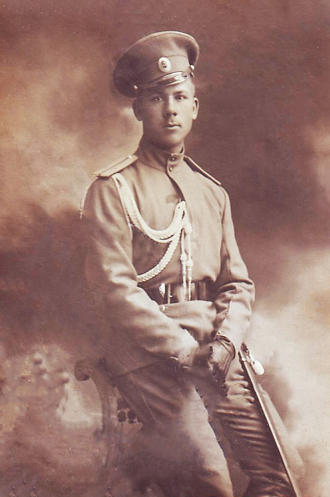 Фотография Котлинского